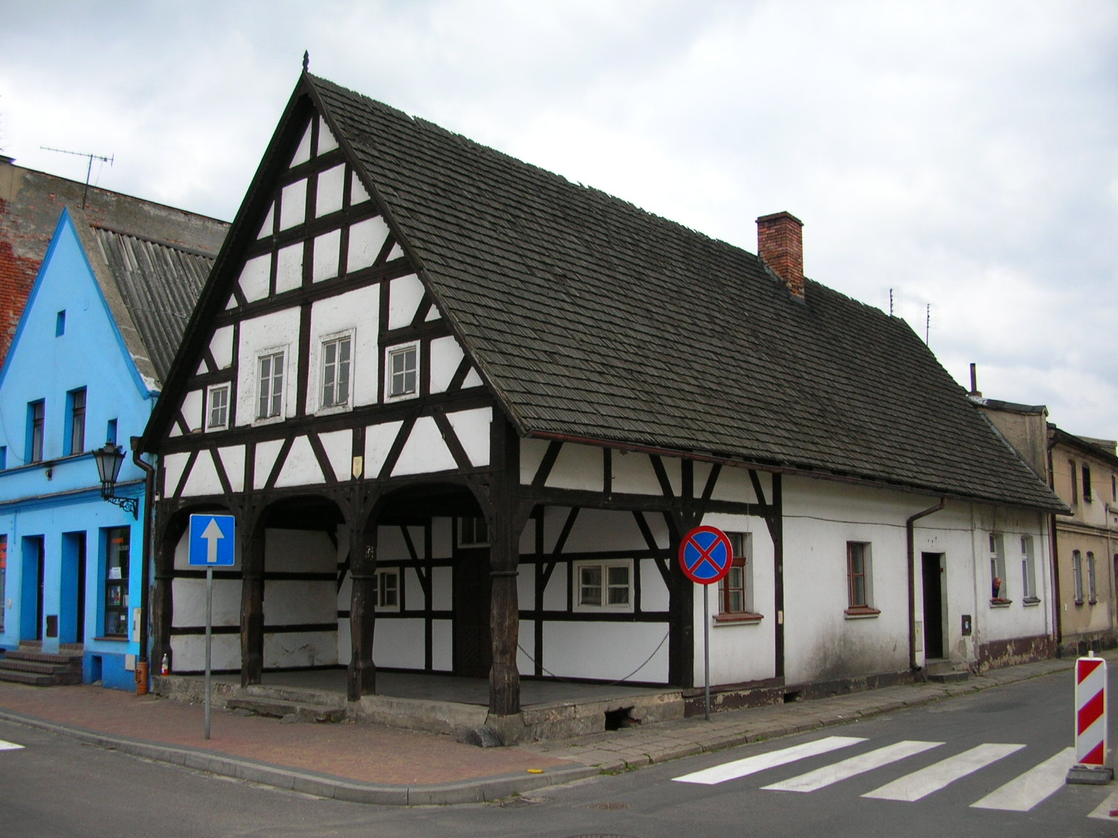 Poniec - zabytkowy dom na ponieckim rynku Autor - Bartek Wawraszko